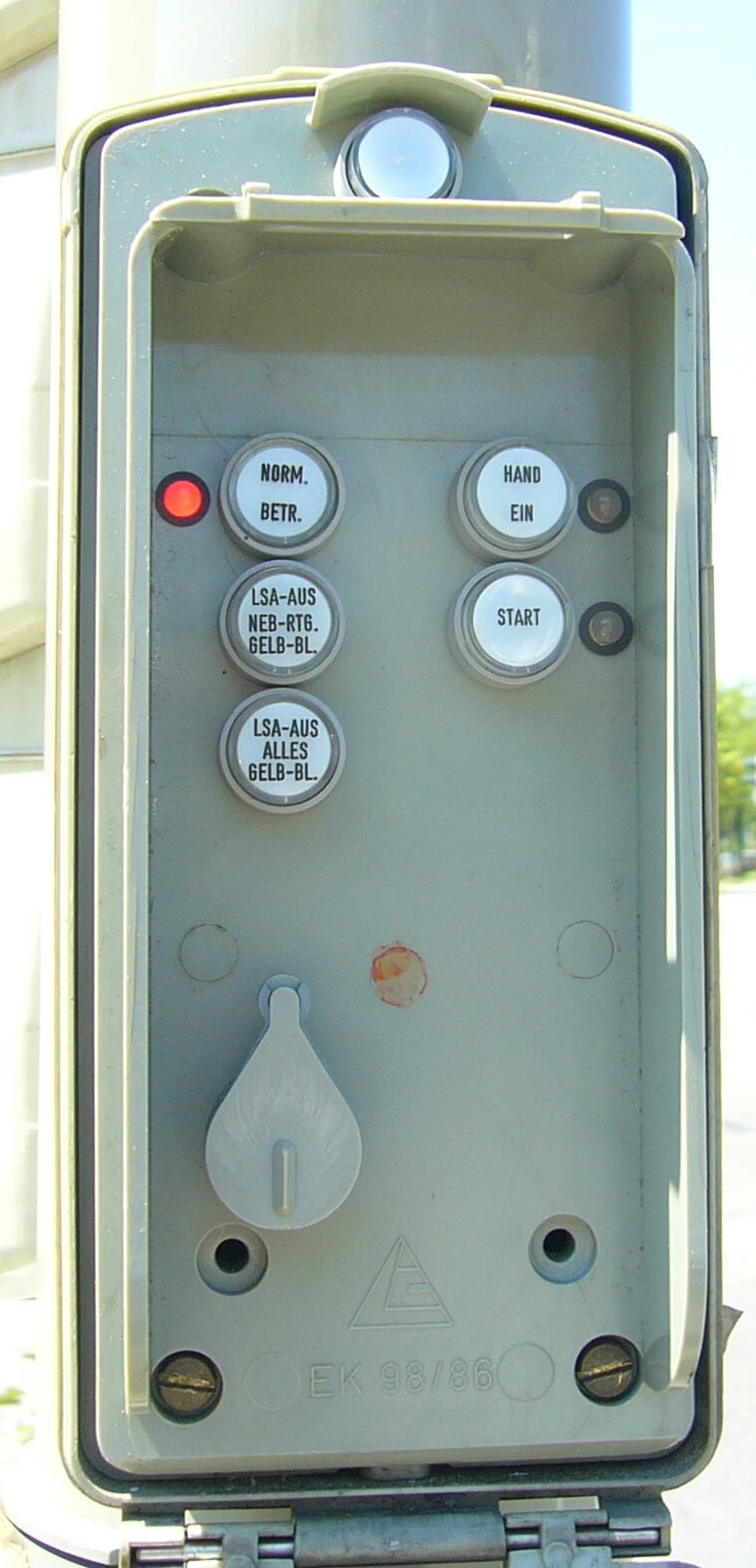 Handschaltung einer Lichtsignalanlage in München